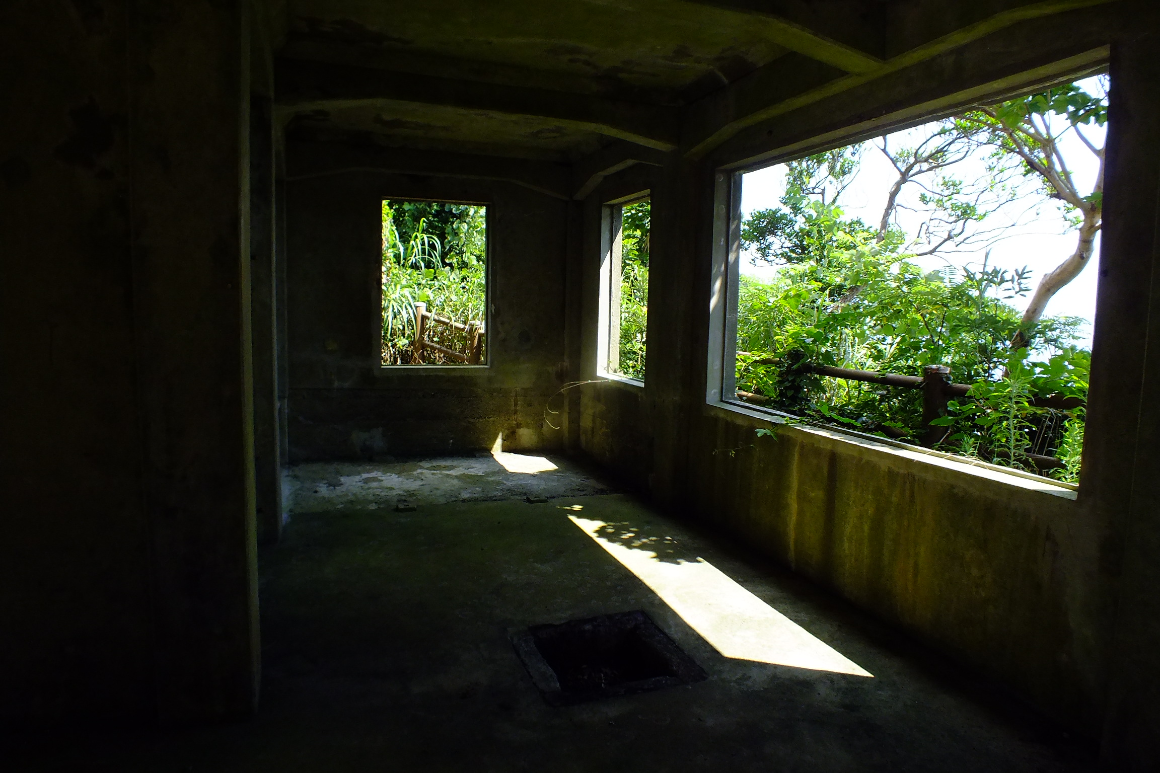 2016-08-05 Kami-shima Island, Kanteki-shô Ruins 神島監的哨跡 三島由紀夫『潮騒』舞台